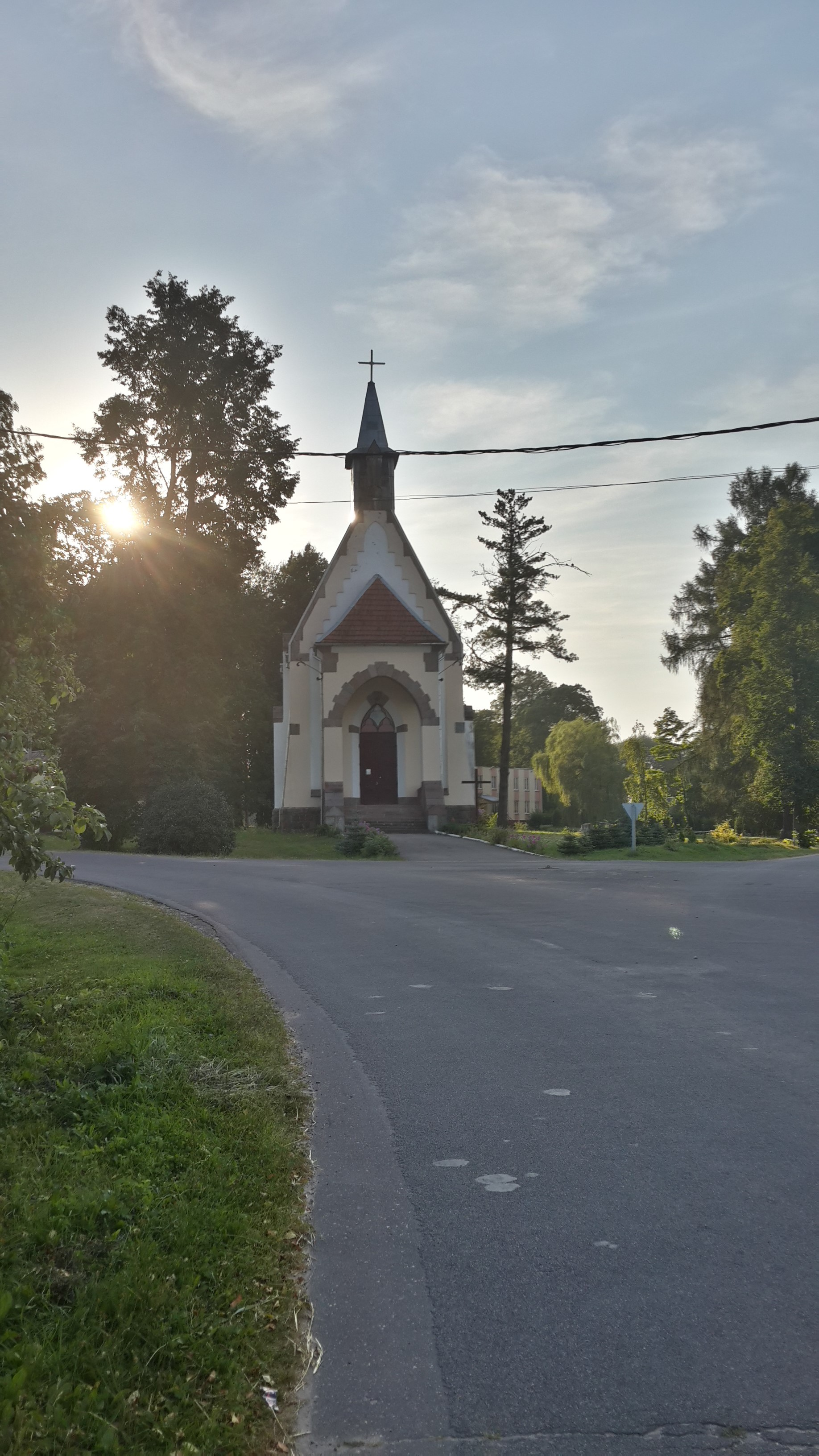 Беларуская (тарашкевіца): Касьцёл, Вязынь